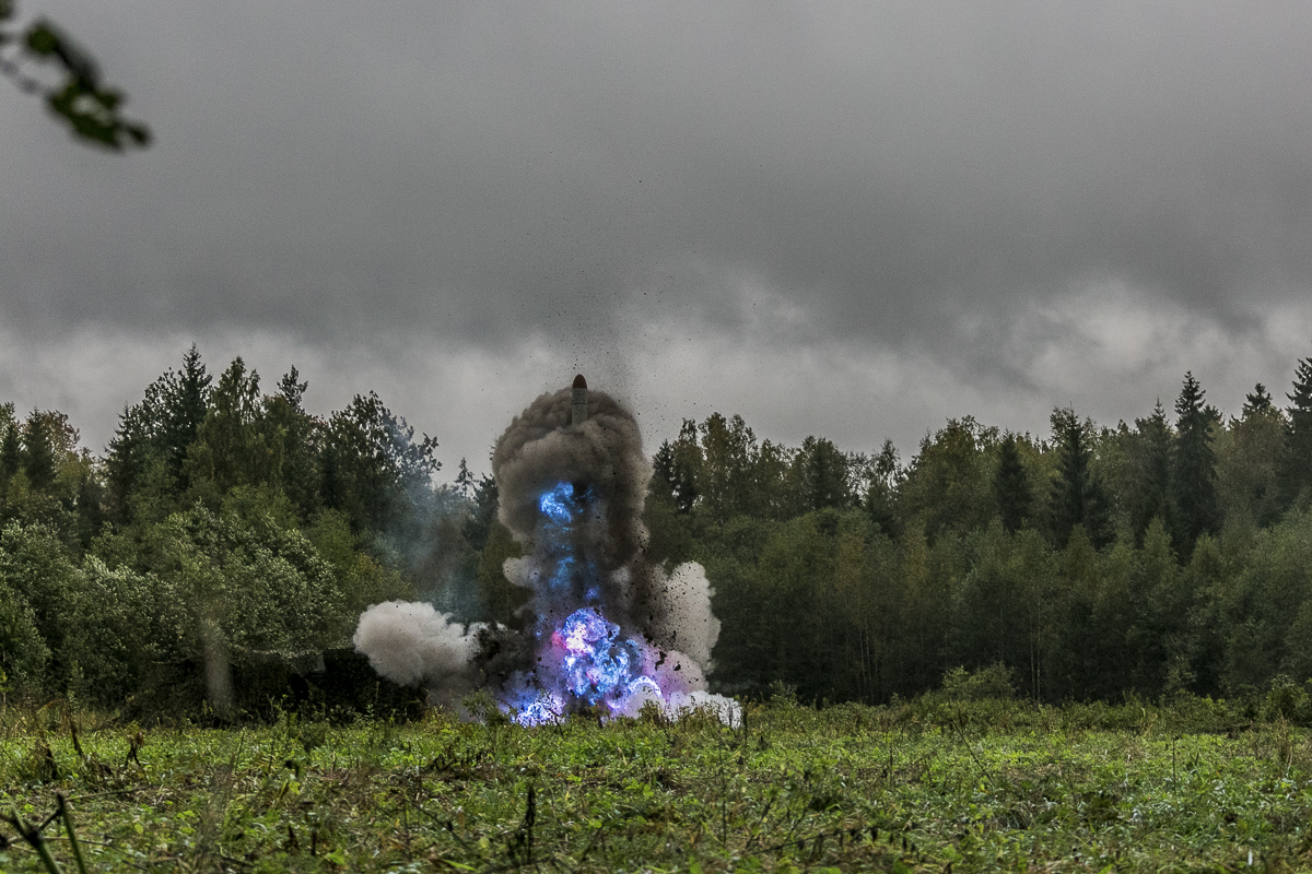 Пуск крылатой ракеты из оперативно-тактического комплекса «Искандер-М» 26-й ракетной Неманской Краснознамённой, орденов Суворова, Кутузова и Александра Невского бригады во время активной фазы учения «Запад-2017» (Ленинградская область).